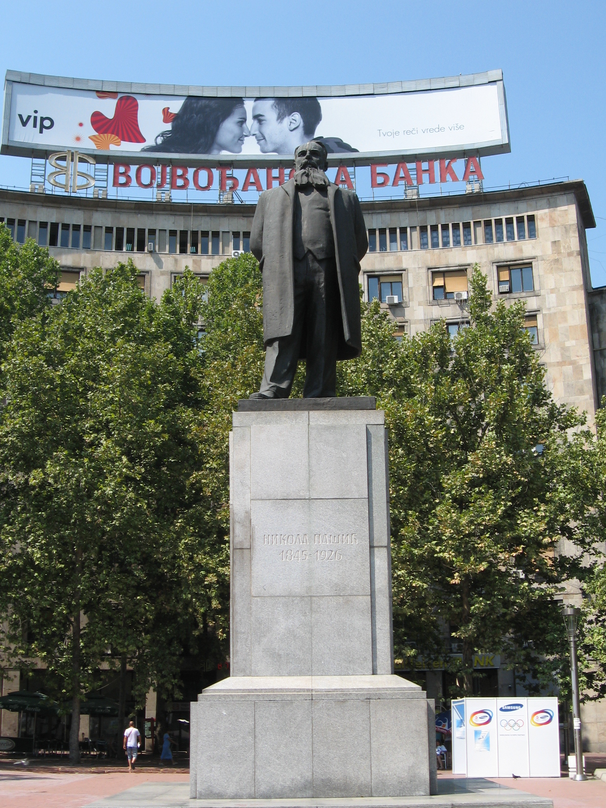 Statue of Nikola Pašić - Trg Nikole Pašića, Belgrade